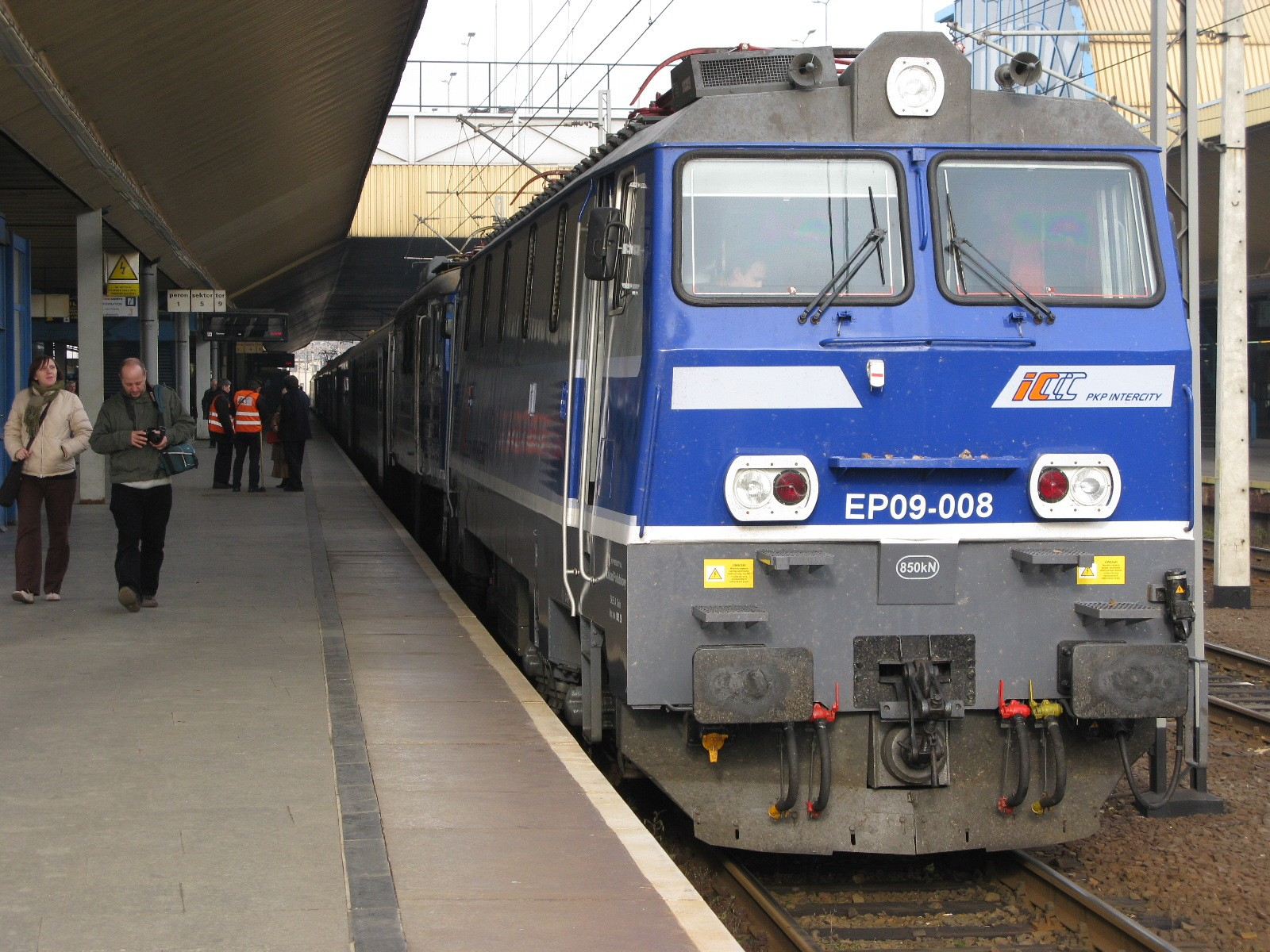 Elektrowóz EP09 na stacji Kraków Główny.